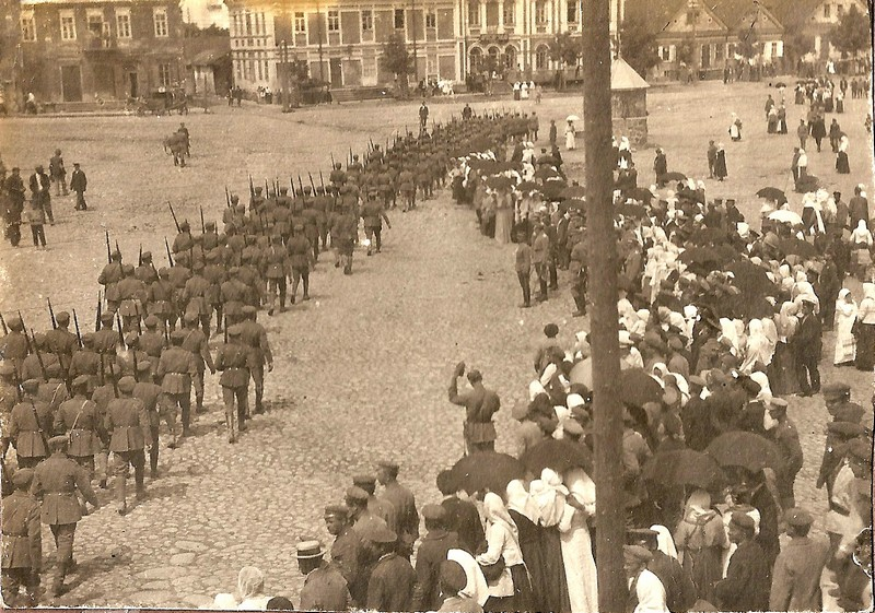 Беларуская (тарашкевіца): Наваградак (Navahradak), рог пляцу Рынку (plac Rynak) і вуліцы Базылянскай (vulica Bazylanskaja).